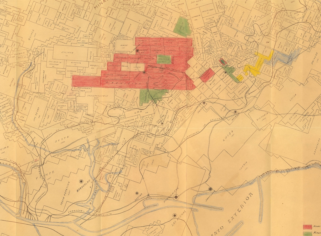 Orconerako meatzeen ustiapenak, koloregorriz eta berdez. plano orokorraren mozketa.